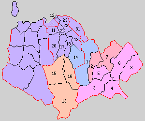 後の福岡県筑紫郡域の町村制時点の町村。